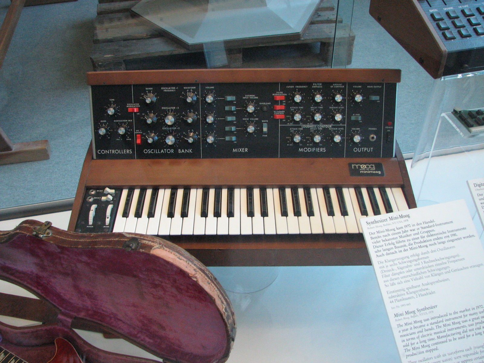 A Minimoog! Robert Moog, Brooklyn, NY/USA, 1978